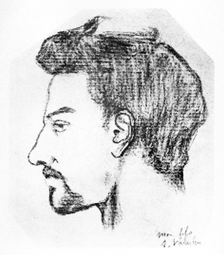 Lithographie du peintre français, Suzanne Valadon, représentant le portrait de Maurice Utrillo.